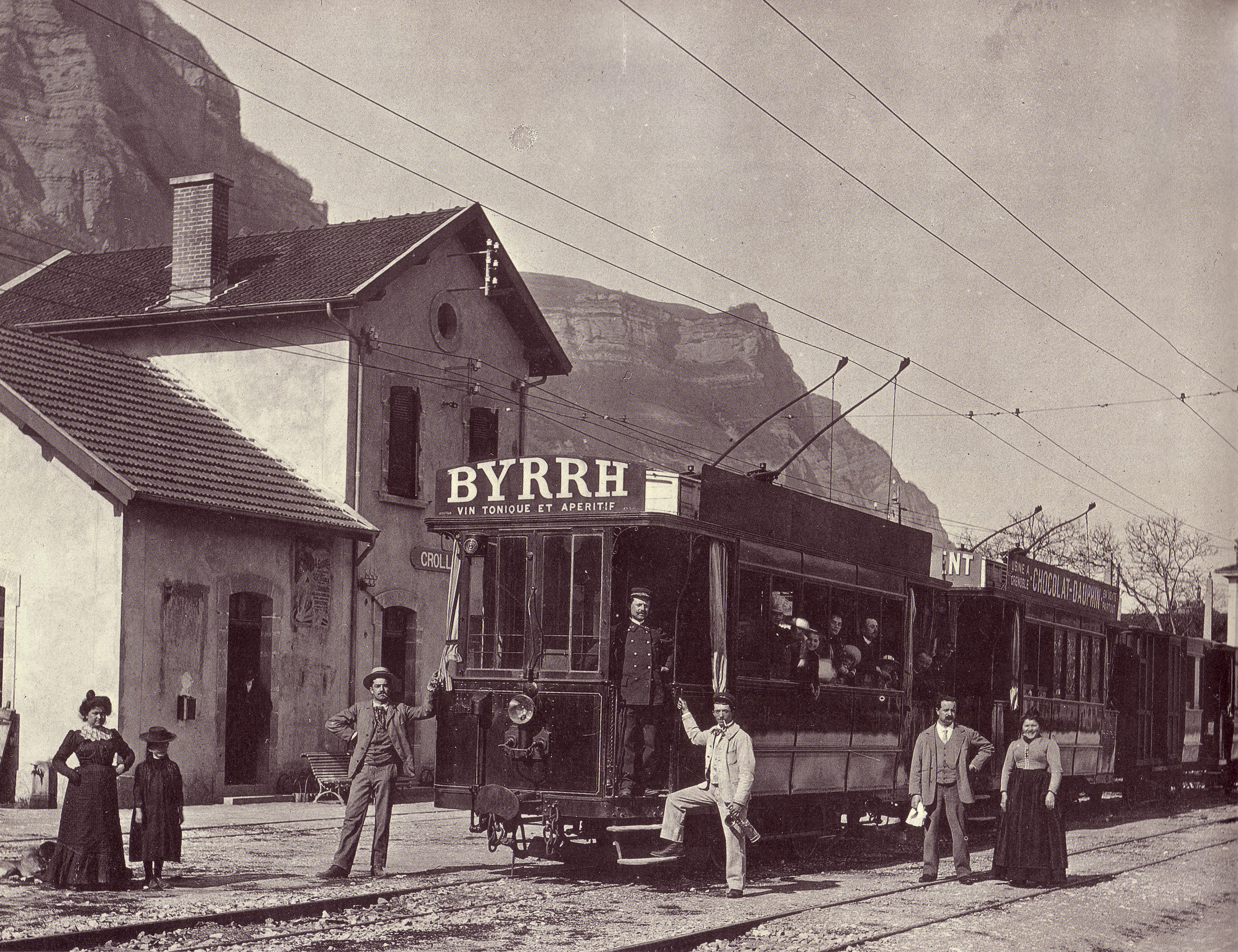 Gare TGC de Crolles en 1901